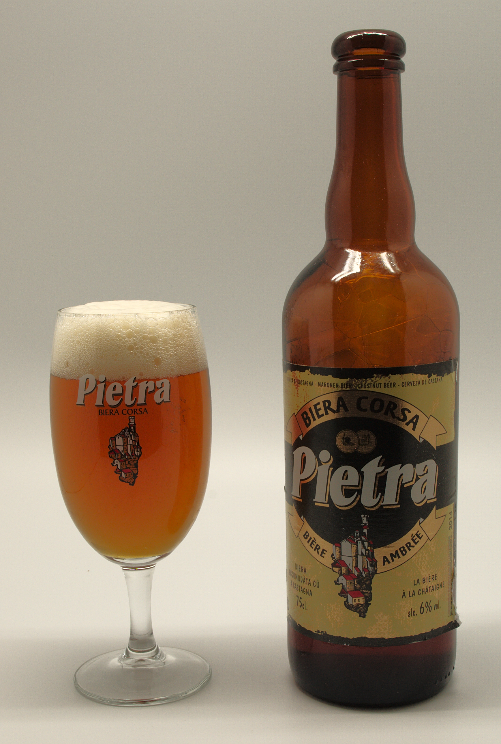 Bouteille de Pietra, bière corse à la chataigne et verre plein.